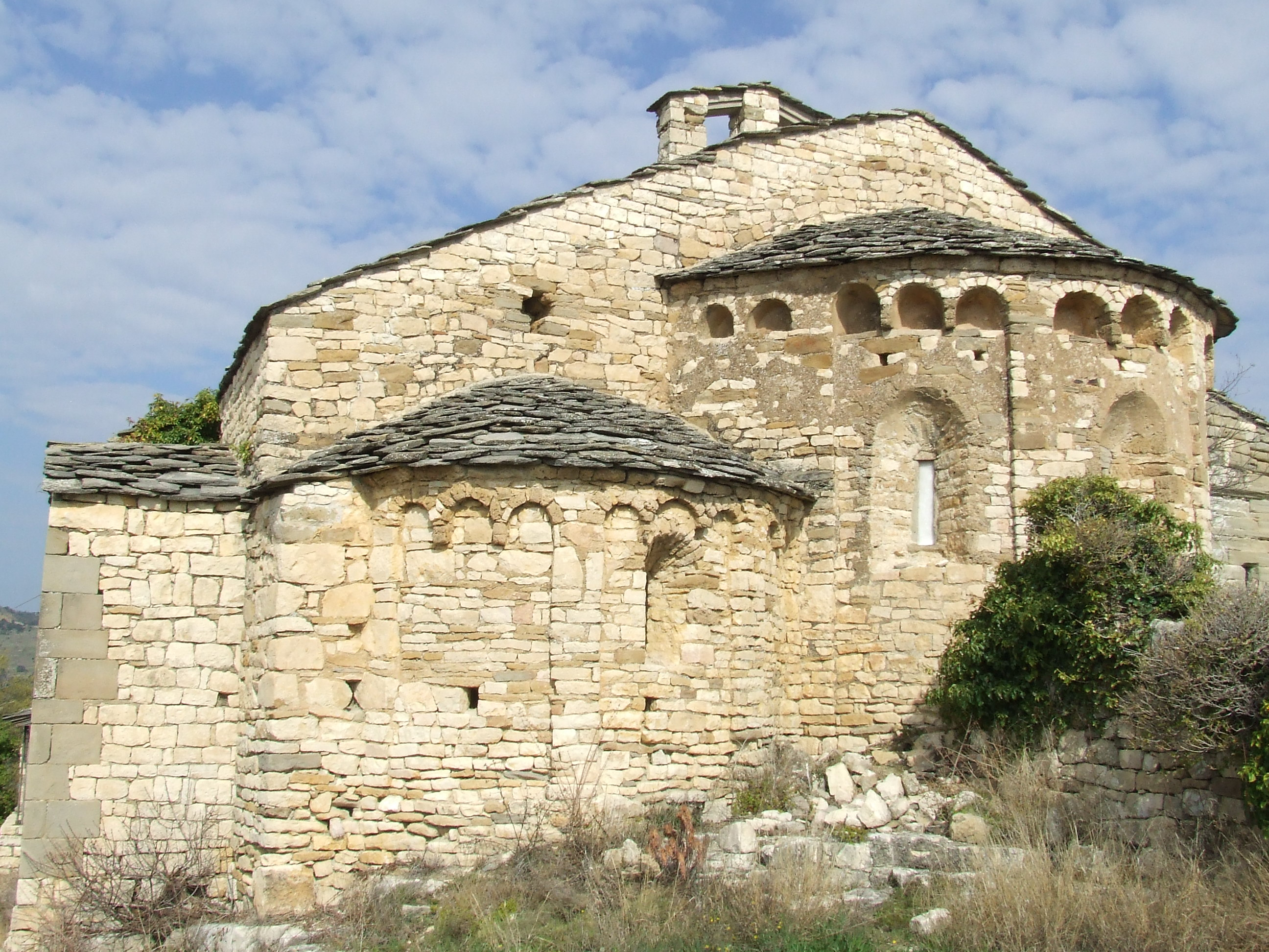 Els absis de Santa Maria de Mur (Mur, Castell de Mur, Pallars Jussà)